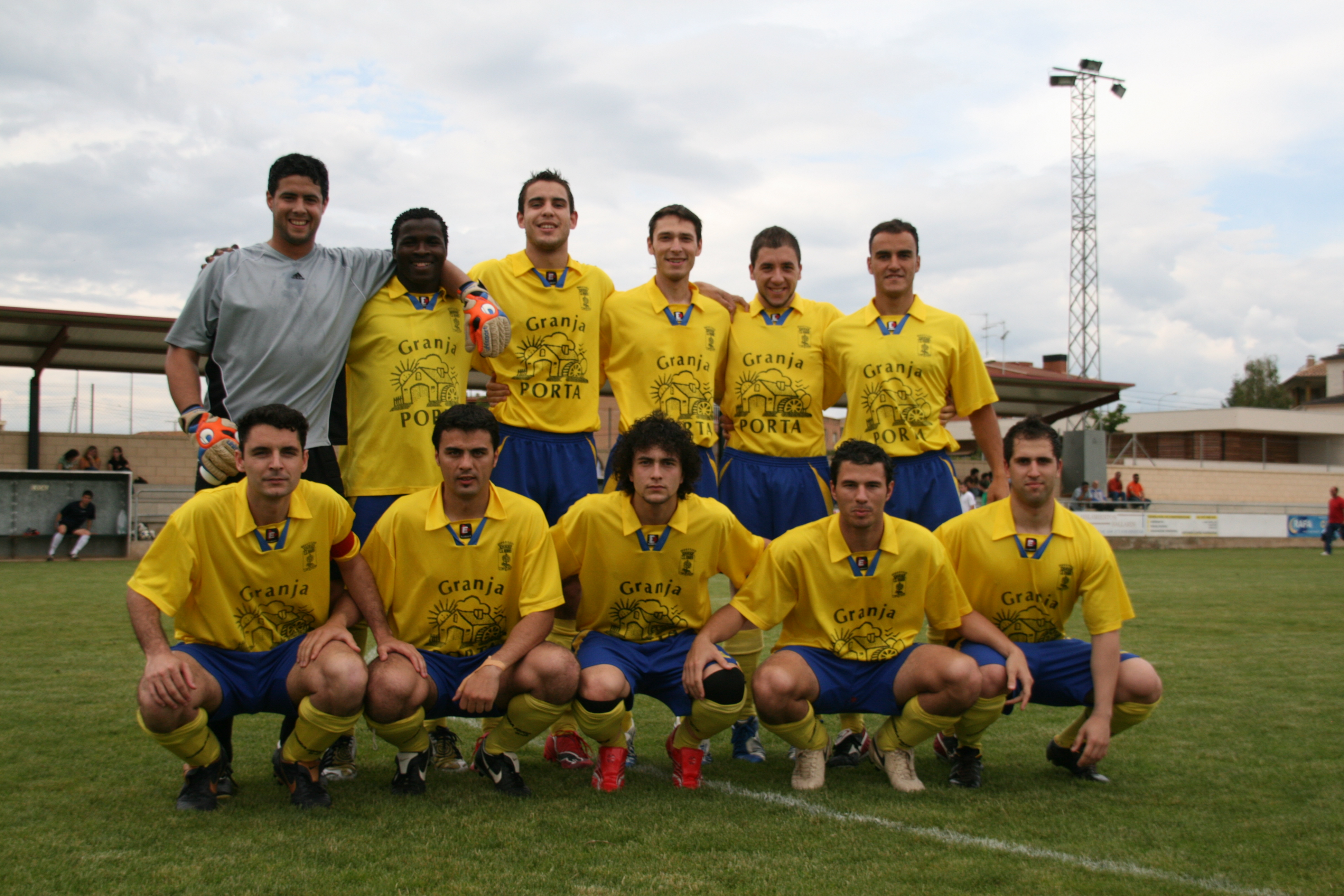 CD Robres contra Reve Altorricón (18/05/2008)